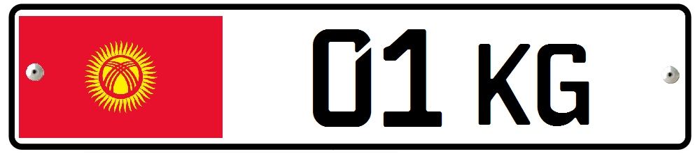 پلاک جدید جمهوری قرقیزستان